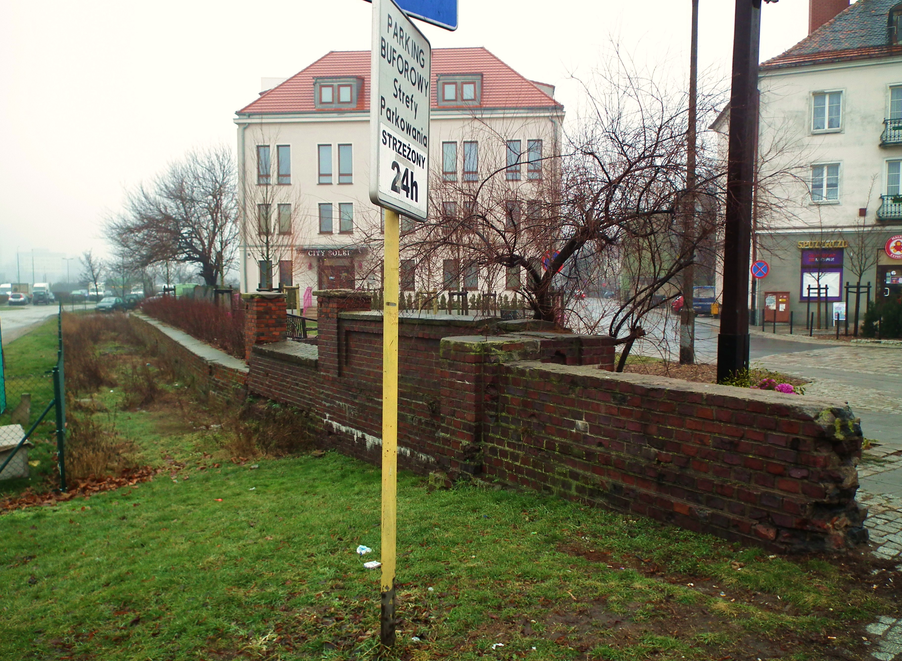 Relikt dawnego Mostu Chwaliszewskiego w Poznaniu. W tle hotel Solei.